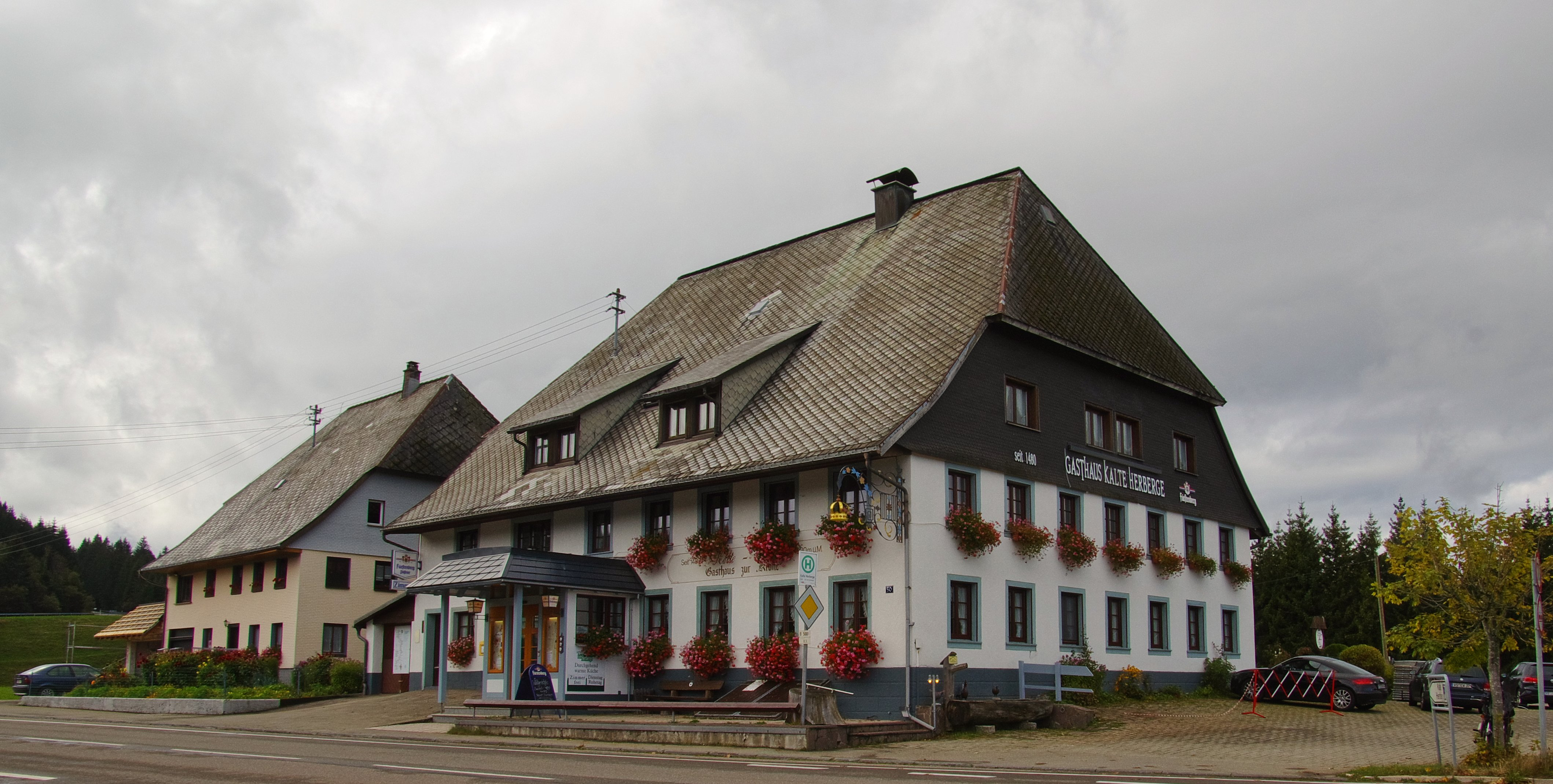 Das Gasthaus Kalte Herberge im Schwarzwald. Hier hängt das Wappen der Winterhalders